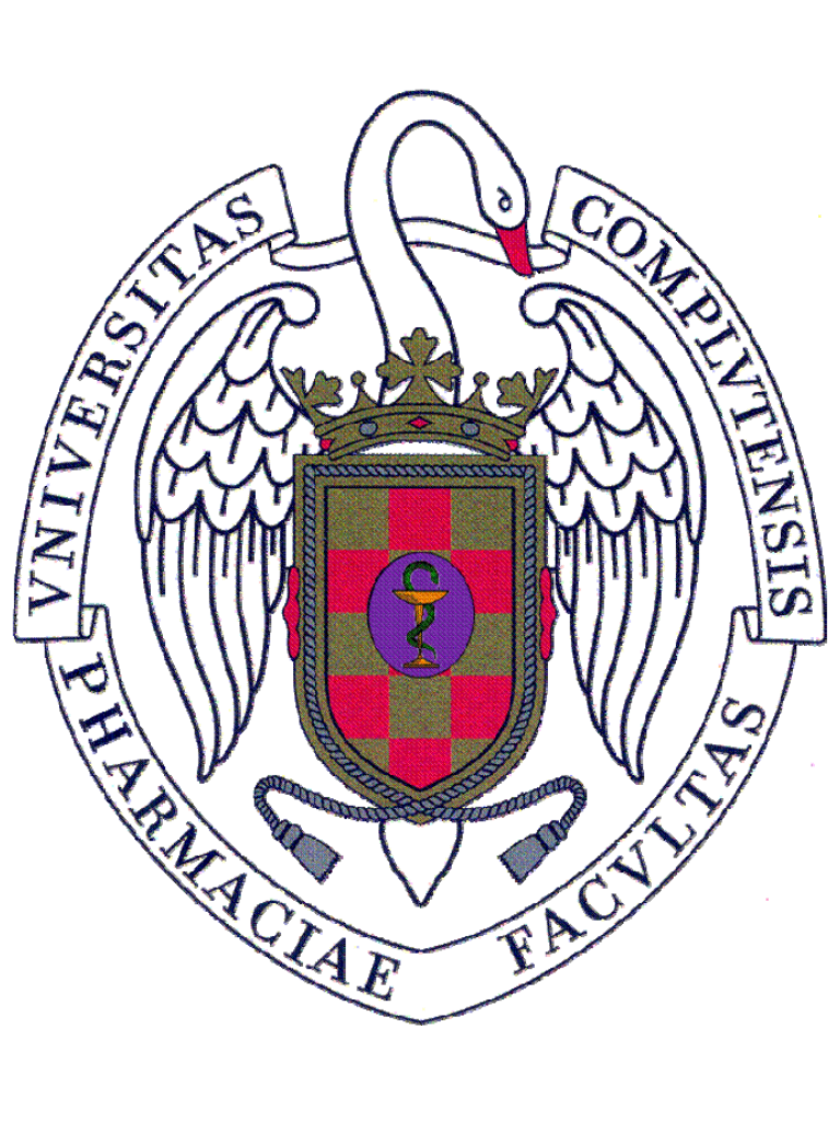 Complutense University of Madrid Faculty of Pharmacy Coat of Arms